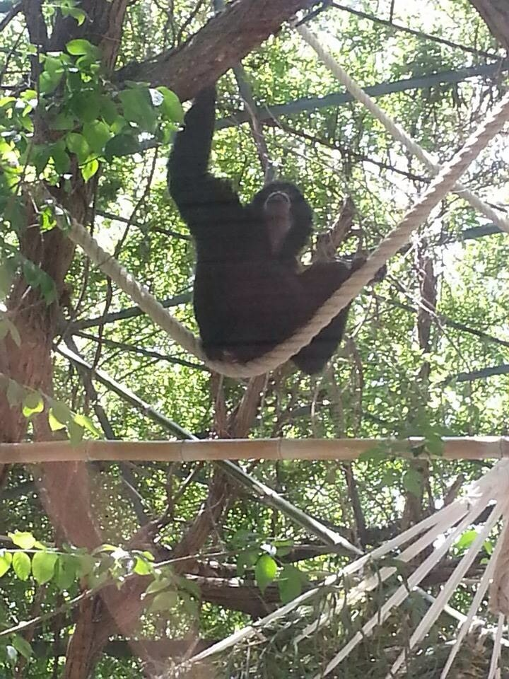 Un dei due gibboni siamenghi presenti allo zoo di Napoli